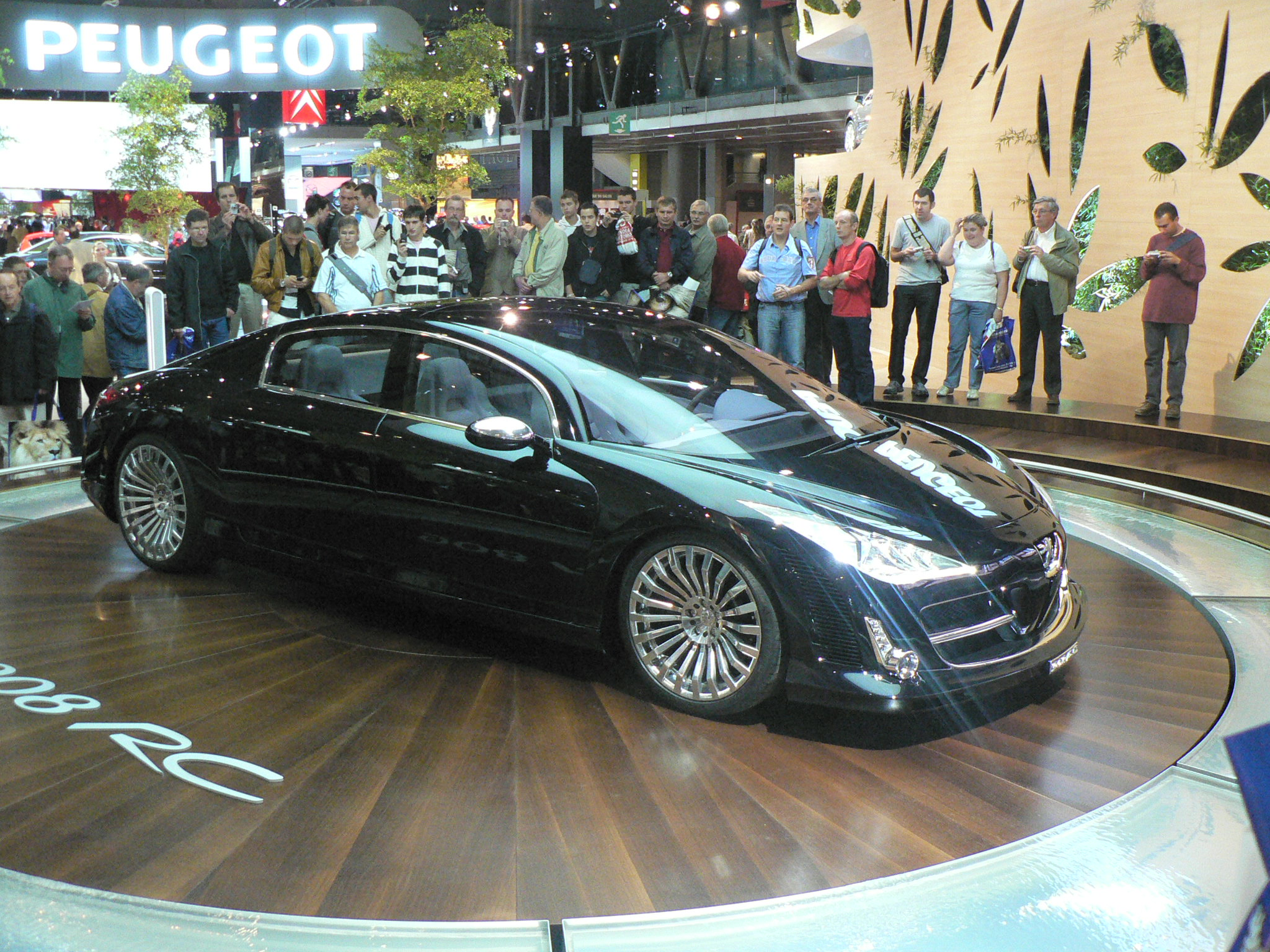 Mondial de l'automobile, Paris 2006